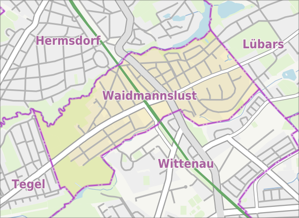 Übersichtskarte der Straßen und Ortslagen in Berlin-Waidmannslust